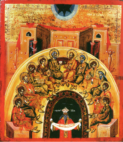 Икона на Слегување на Светиот Дух во црквата „Св. Димитриј“ во Битола